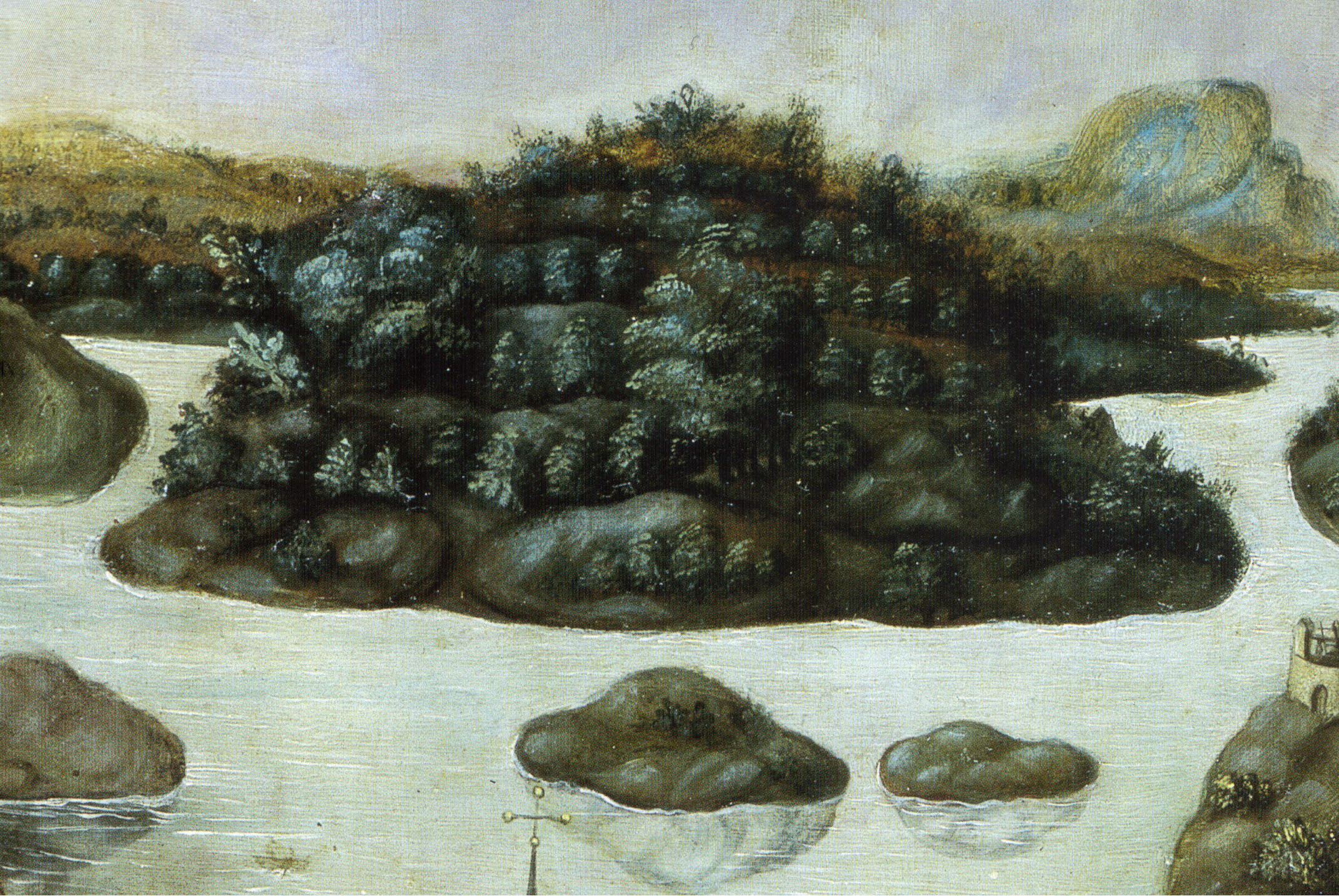 Detail from Vädersolstavlan showing Djurgården.